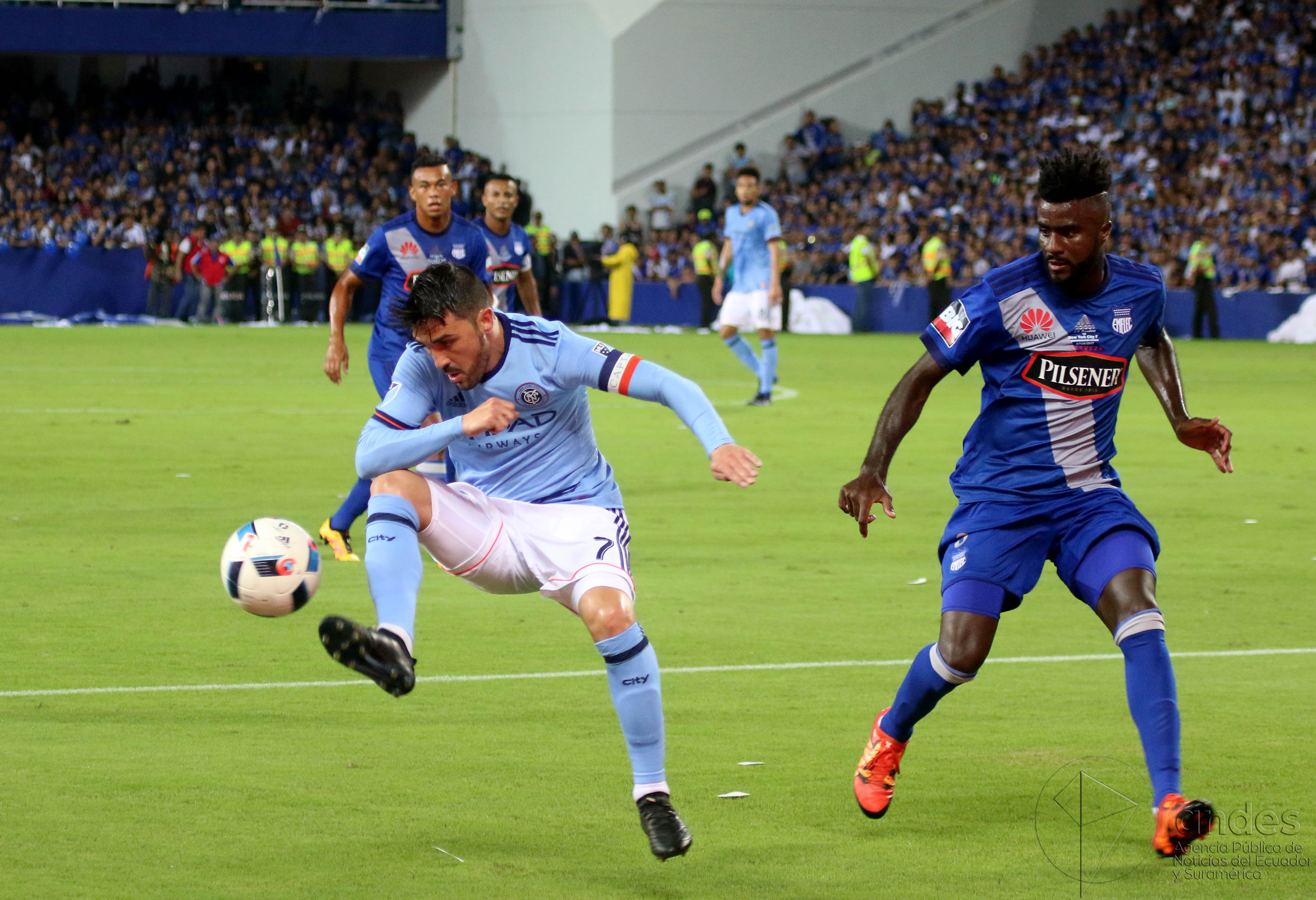 Guayaquil, miércoles 08 de febrero del 2017 (Andes).-Emelec enfrenta al New York City en la reinaguración del estadio Capwell Foto:Andes/César Muñoz